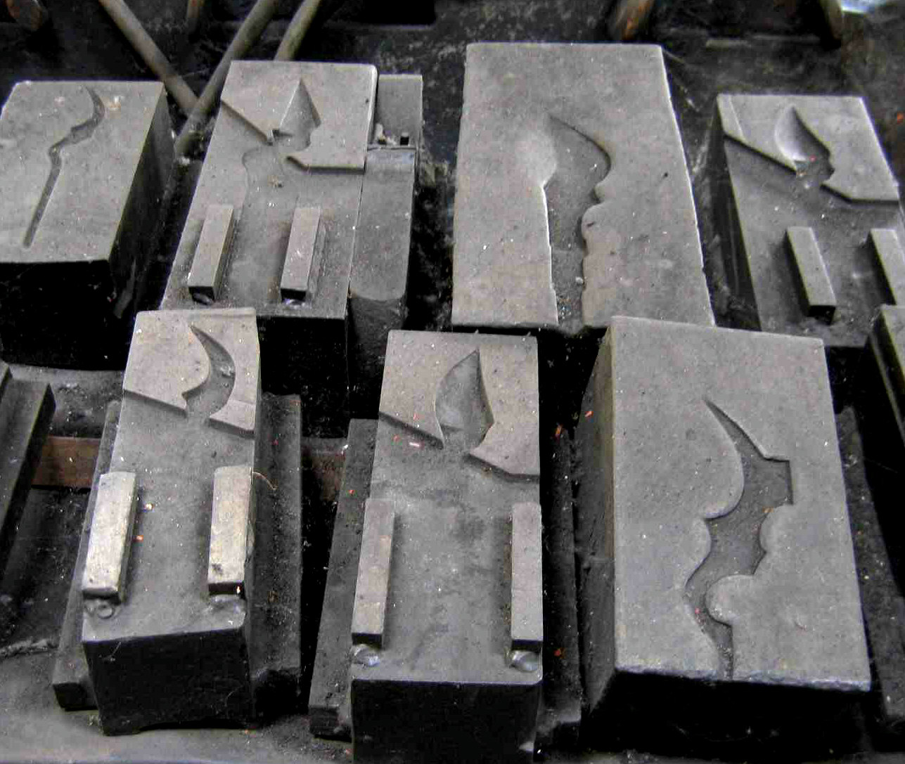 Forges de Pesmes, empreintes d'outillages pour forgeage - Pesmes - Haute-Sâone - France